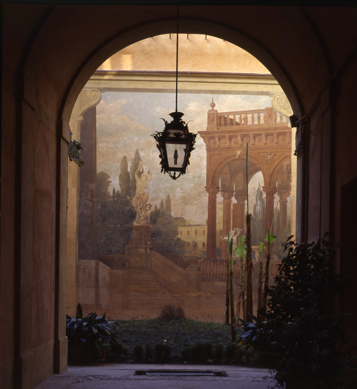 Enrico Tabellini-Museo della musica, Ingresso Palazzo Sanguinetti - Museo della musica